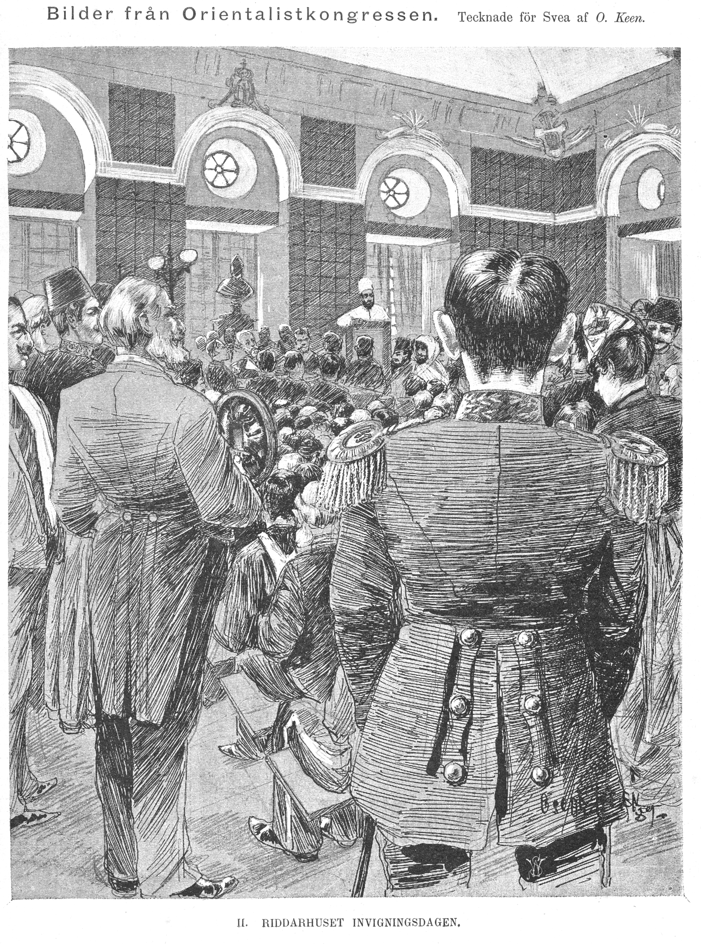 Den VIII:de internationella orientalkongressen i Stockholm och Oslo 1889. Bild från tidskriften Svea 1889.